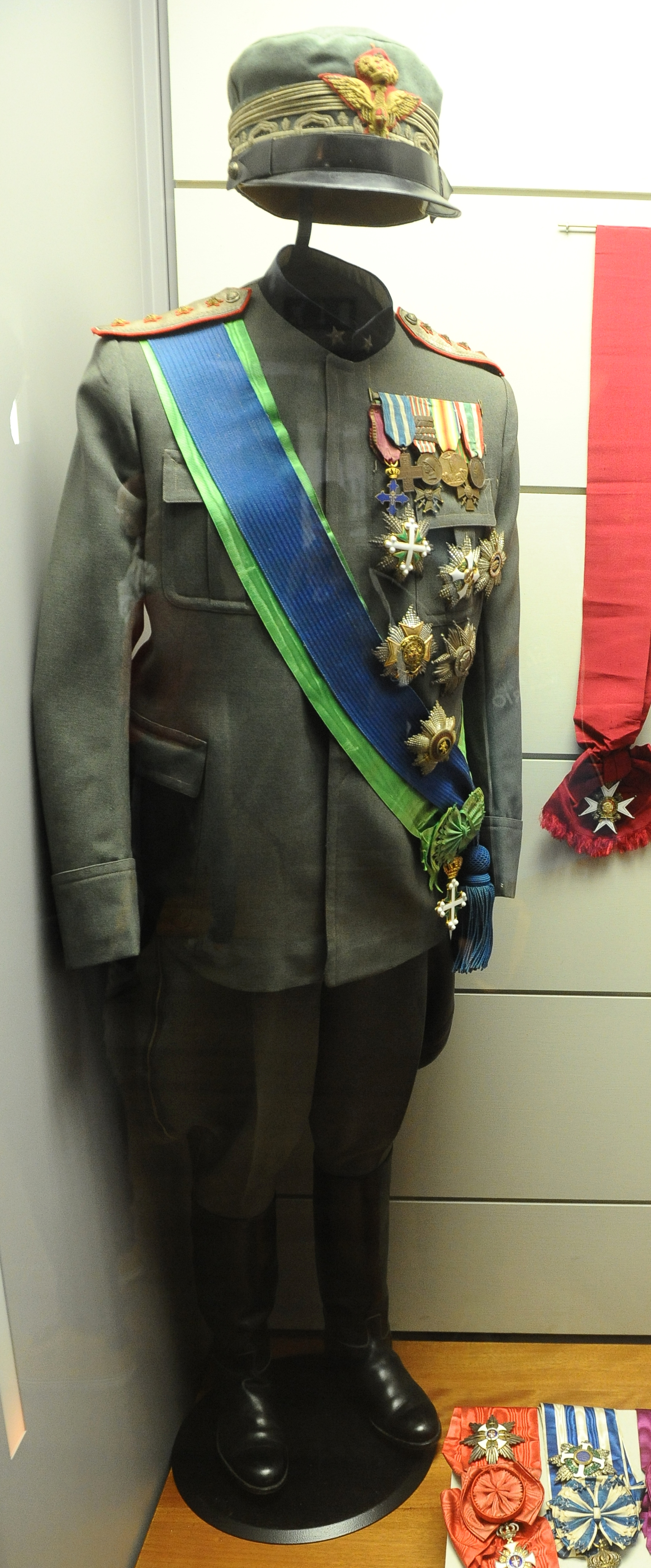 Uniforme del Generale Luigi Cadorna, Comandante dell'Esercito Italiano fino al 1917, al Museo Storico Italiano della Guerra.